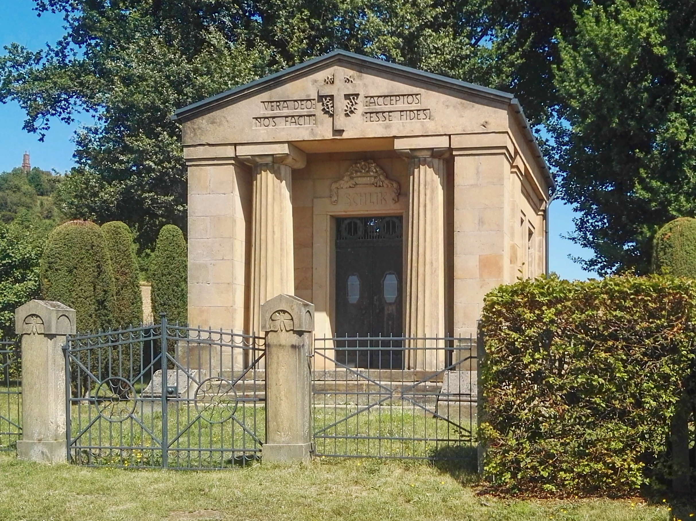 Rodinná hrobka Šliků ve Veliši od Václava Weinzettla z roku 1926